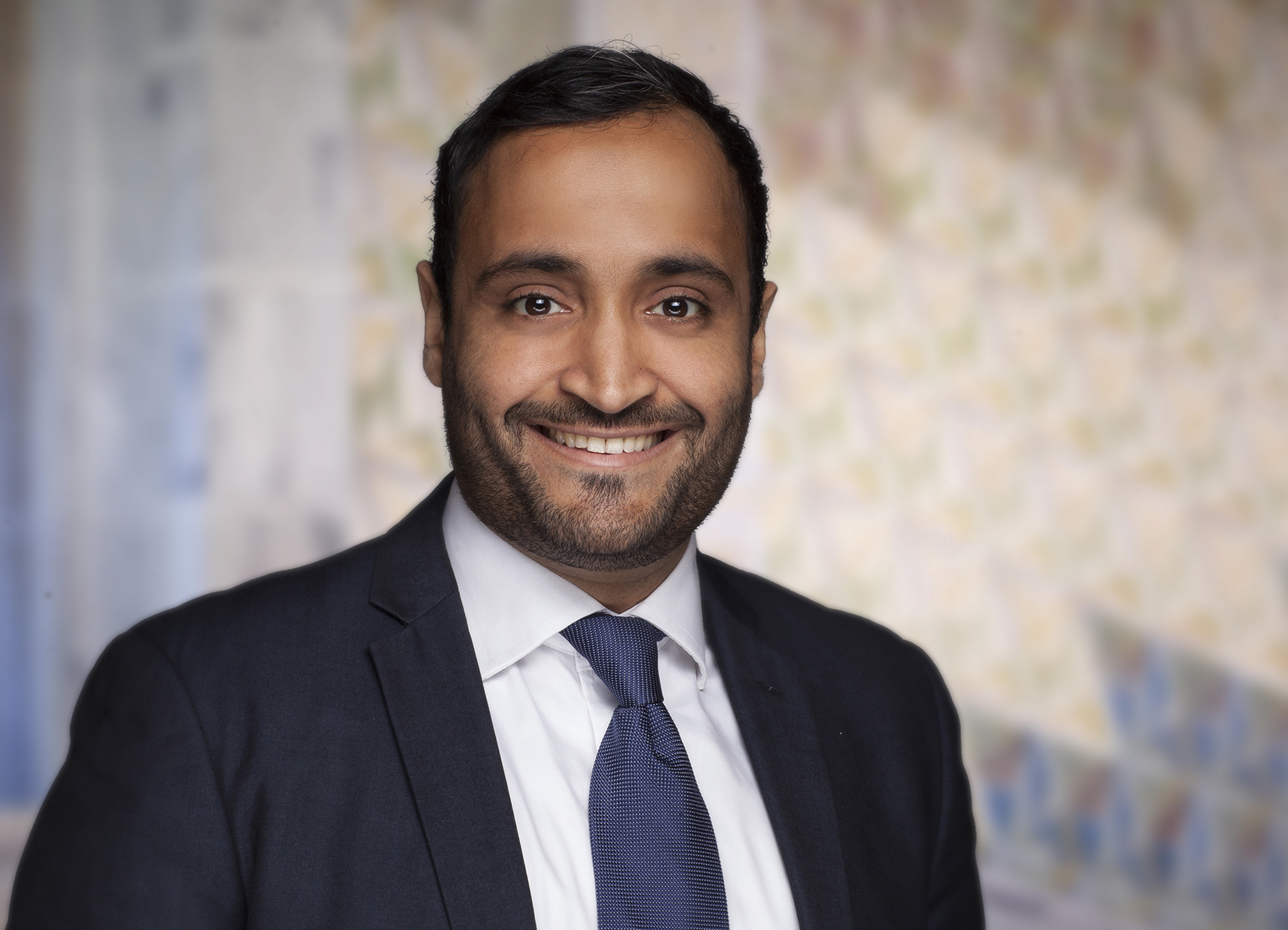 Foto: Oslo kommune/Sturlason